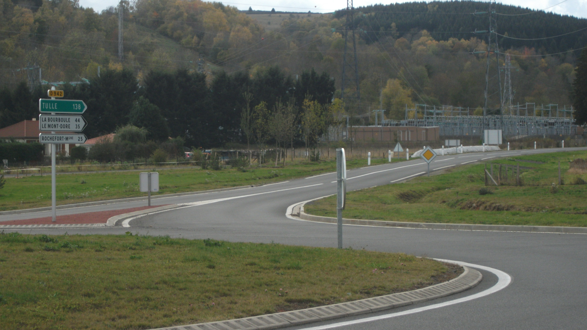 La RD 942 en direction de Tulle (138 km), La Bourboule (44 km) Le Mont-Dore (35 km), Rochefort-Montagne (25 km) Ensemble de panneaux implanté suite à la création d'un carrefour giratoire.